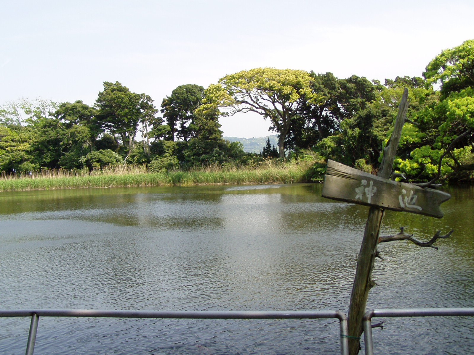 Osemyoujin kamiike in Osezaki Numazu Shizuoka Japan. 大瀬崎の大瀬明神「神池」。伊豆七不思議のひとつで、小さな半島の先端にあり、海抜1mにありながら淡水の池である。淡水魚が生息し、餌を投げ込むと鯉がみられる。